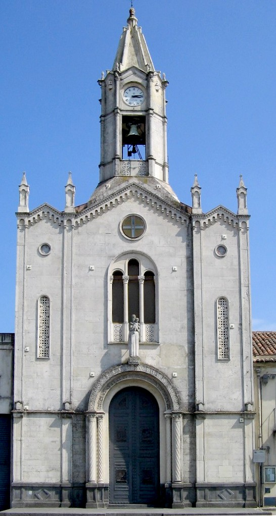 Chiesa parrocchiale di San Giuseppe in Pisano Etneo, frazione di Zafferana Etnea (CT) - Foto D. Pennisi